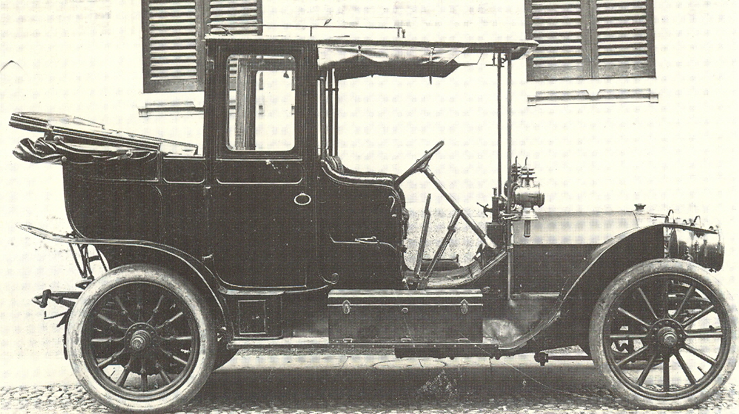 Fiat 28/40 hp Cabriolet-Royal (1908)